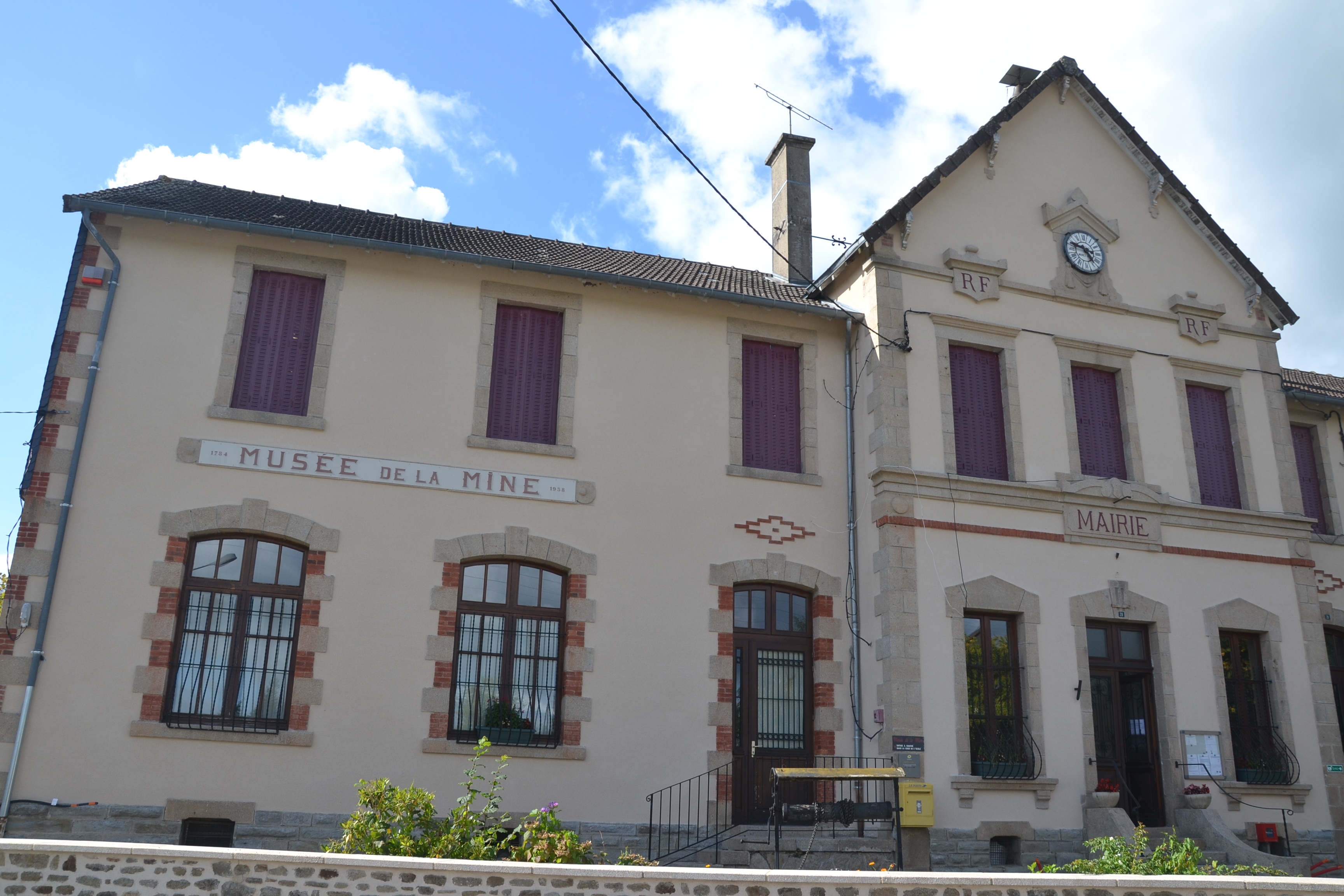 Mairie et musée de la mine de Bosmoreau-les-Mines (Creuse, France).